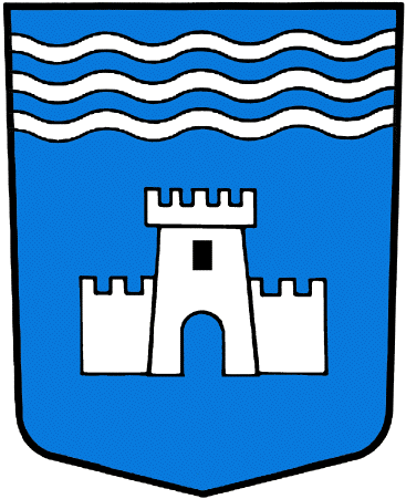 Wappen der Gemeinde Evionnaz (Schweiz)